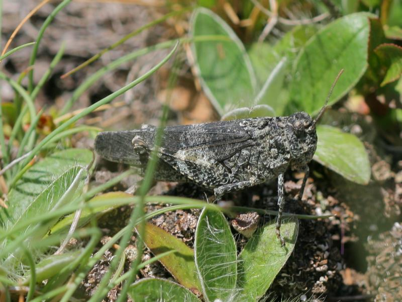 Rotflüglige Schnarrschrecke (Psophus stridulus)